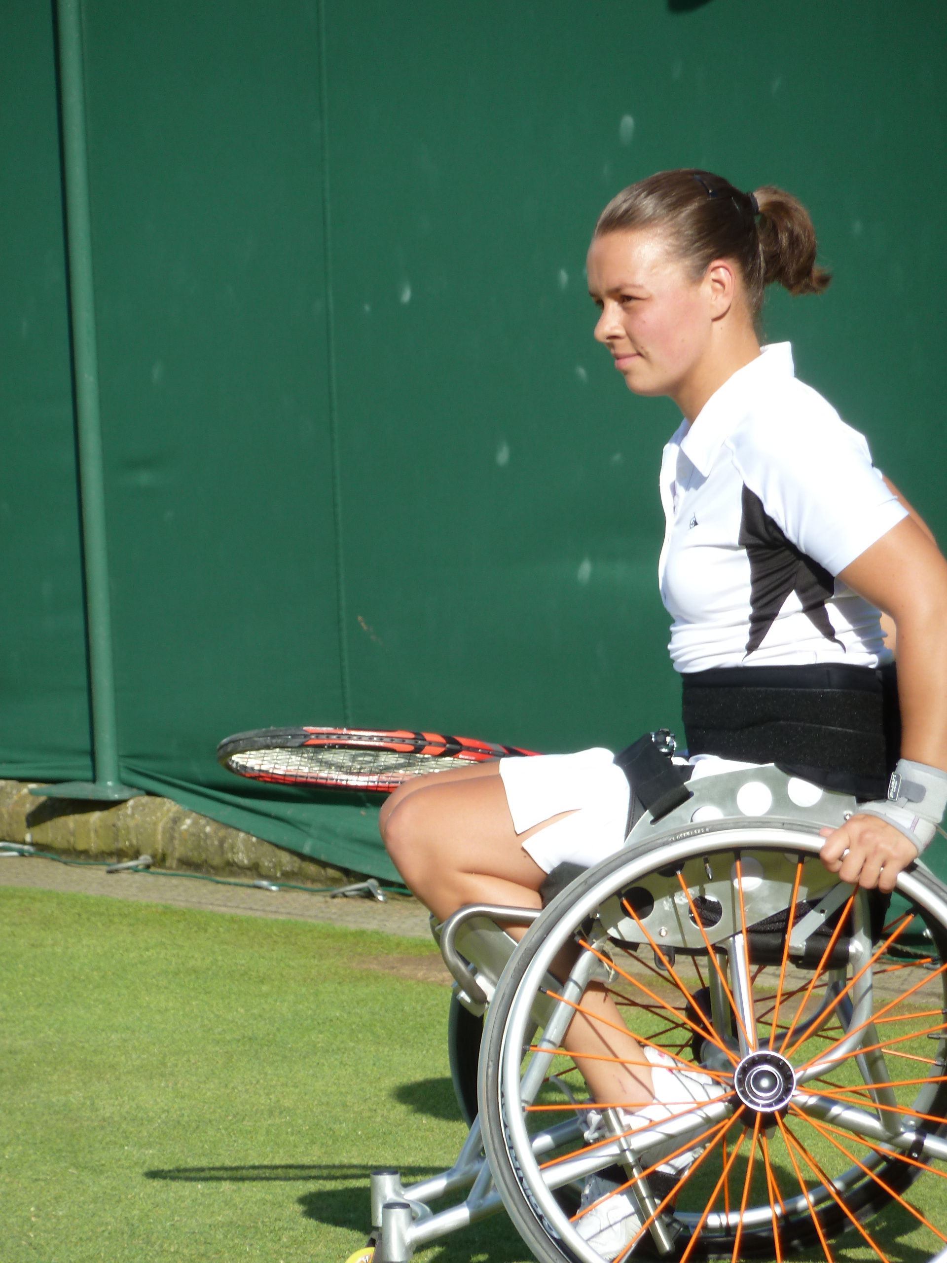 Marjolein Buis.